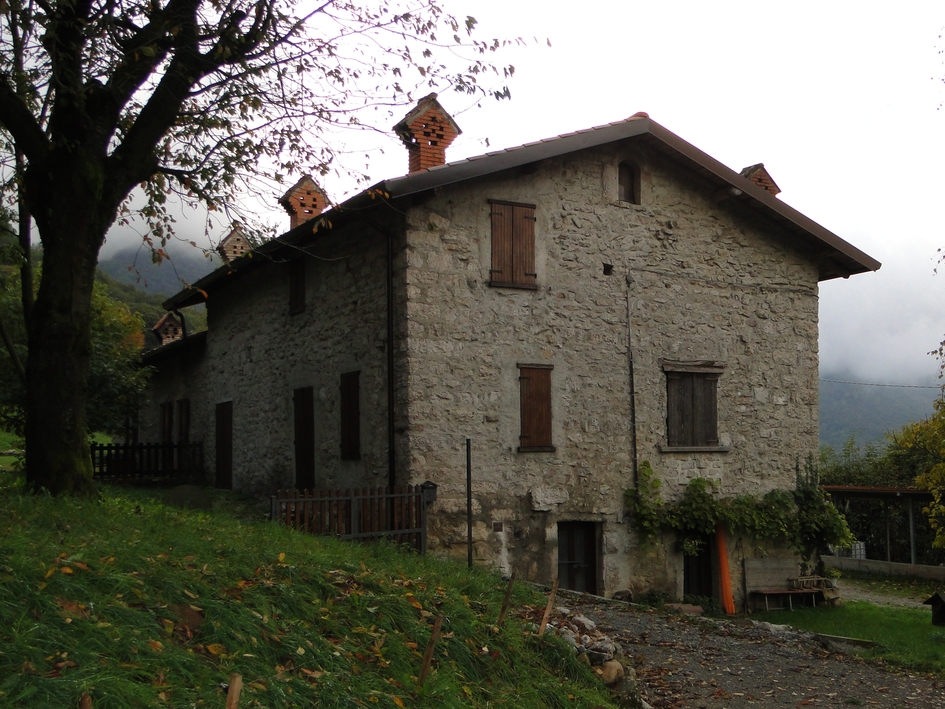 Abbazia, fraz. di Albino (BG). Località Plazza